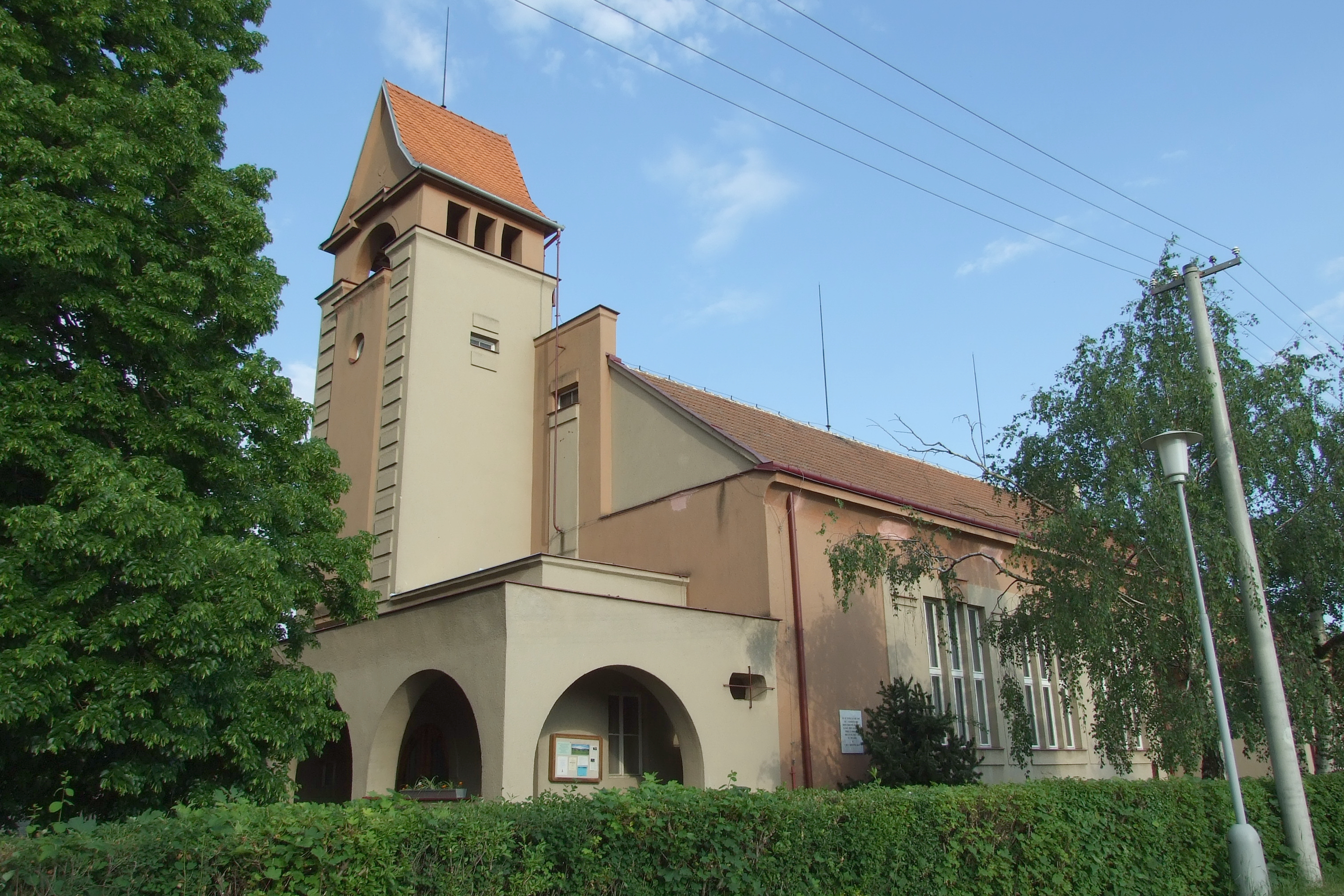 Tuřany - Husův sbor